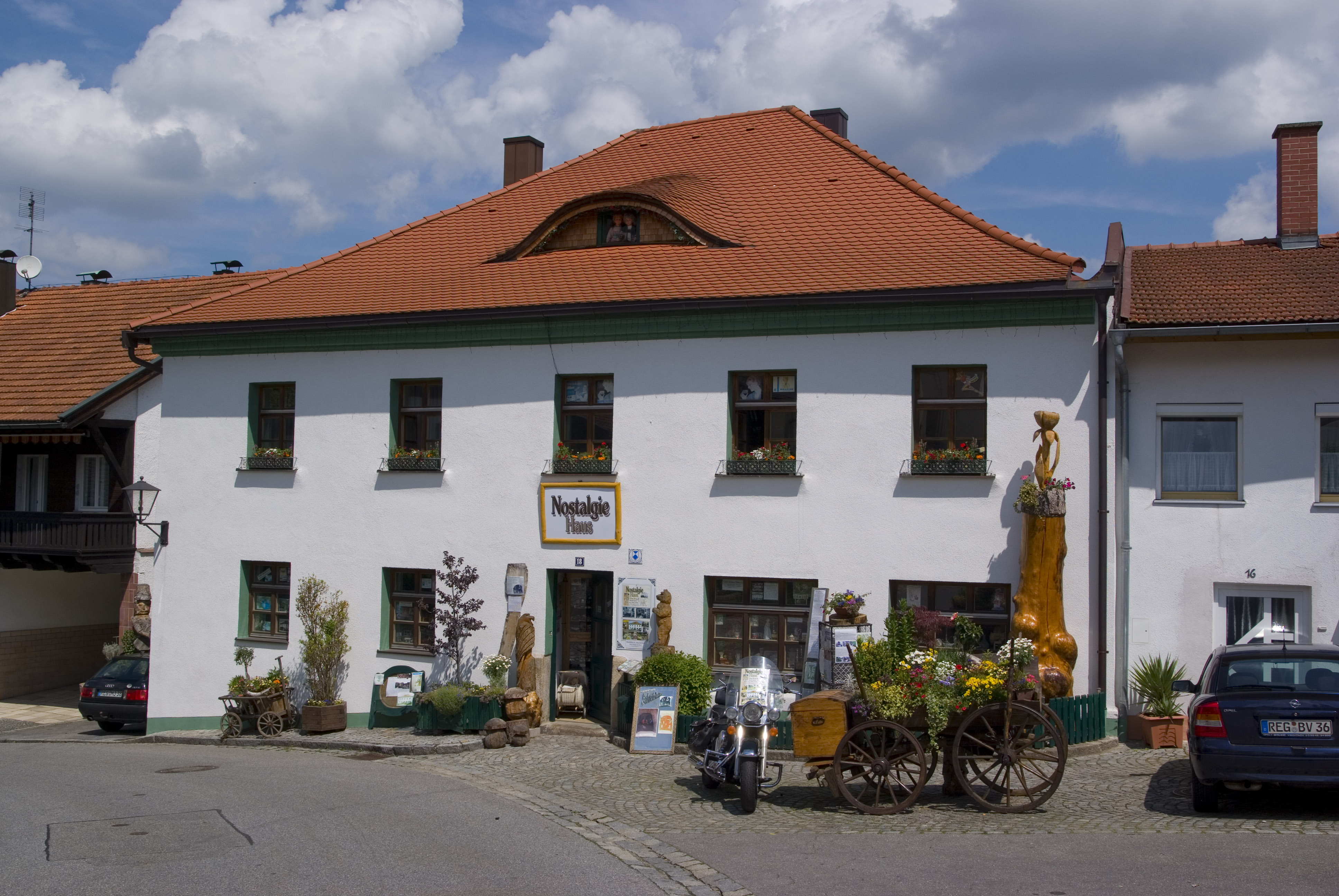 Nostalgiemuseum in Viechtach, Bäckergasse 18